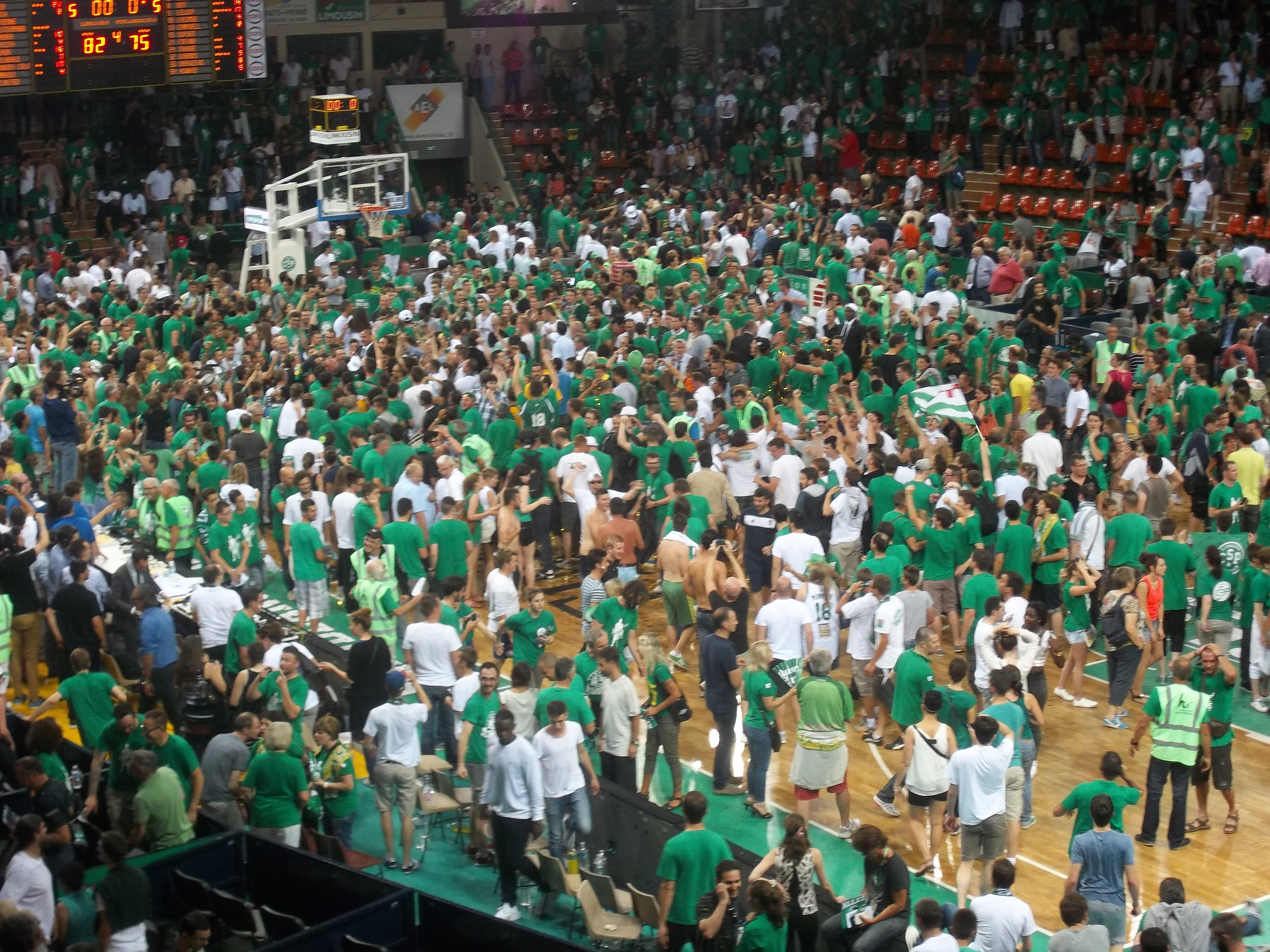 Le public de Beaublanc fête le titre de champion de France 2015 de basket-ball